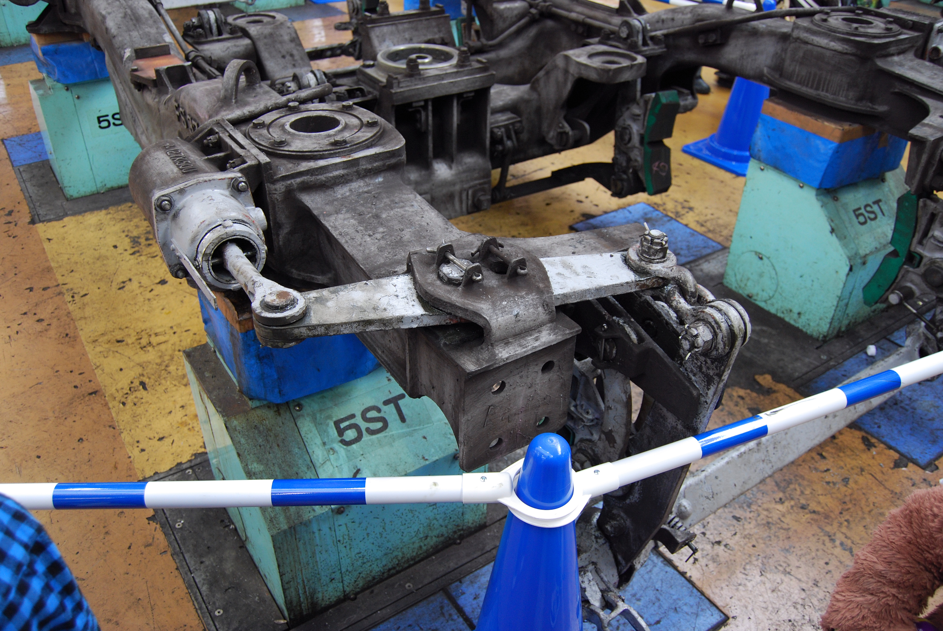 鉄道車両台車の基礎ブレーキ装置（スマイルフェスタ2010イベントでの綾瀬車両基地開放時に撮影）